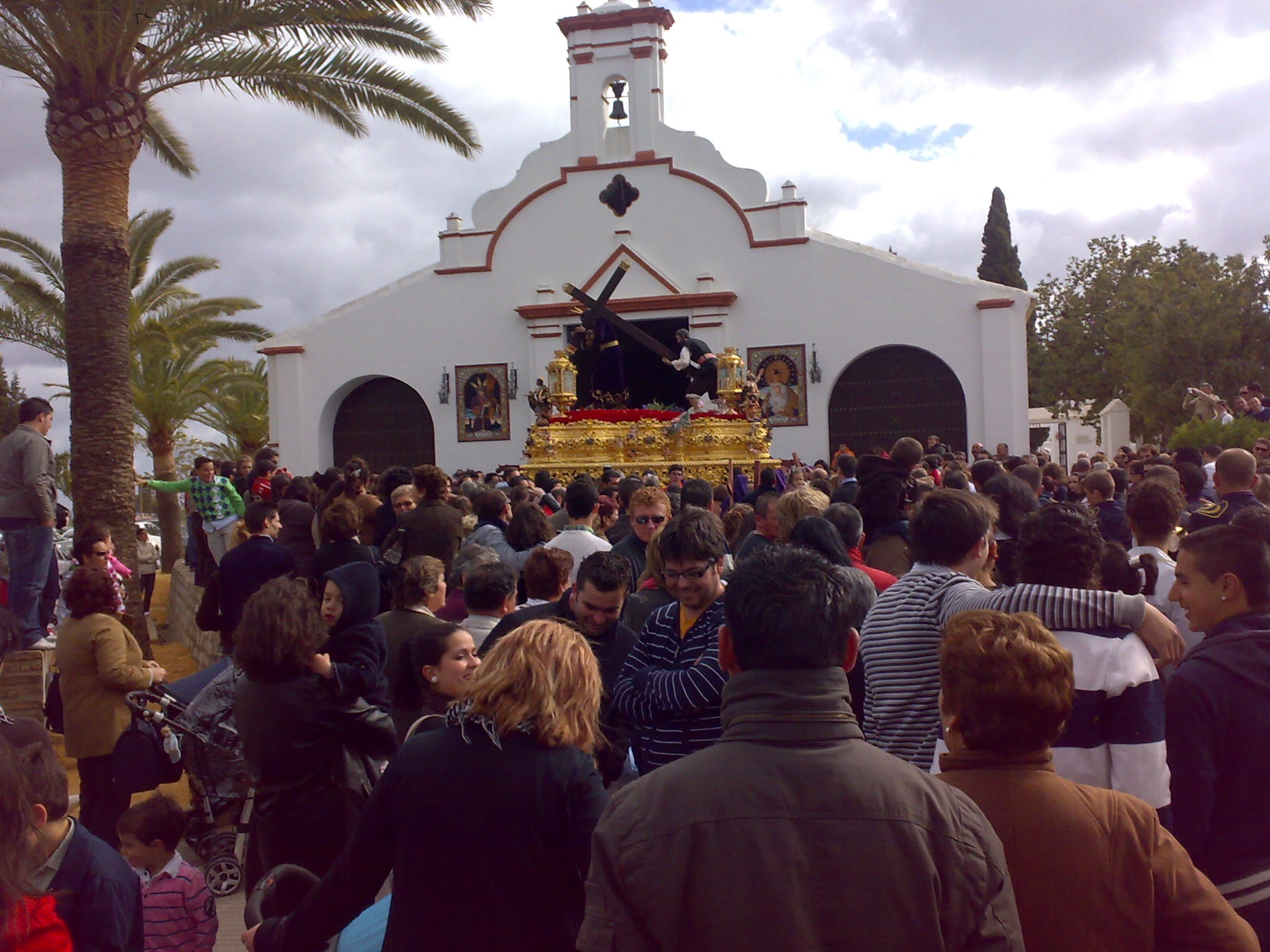 Procesión Viernes Santo madrugada. Provincia de Huelva. Hdad. de Padre Jesus.